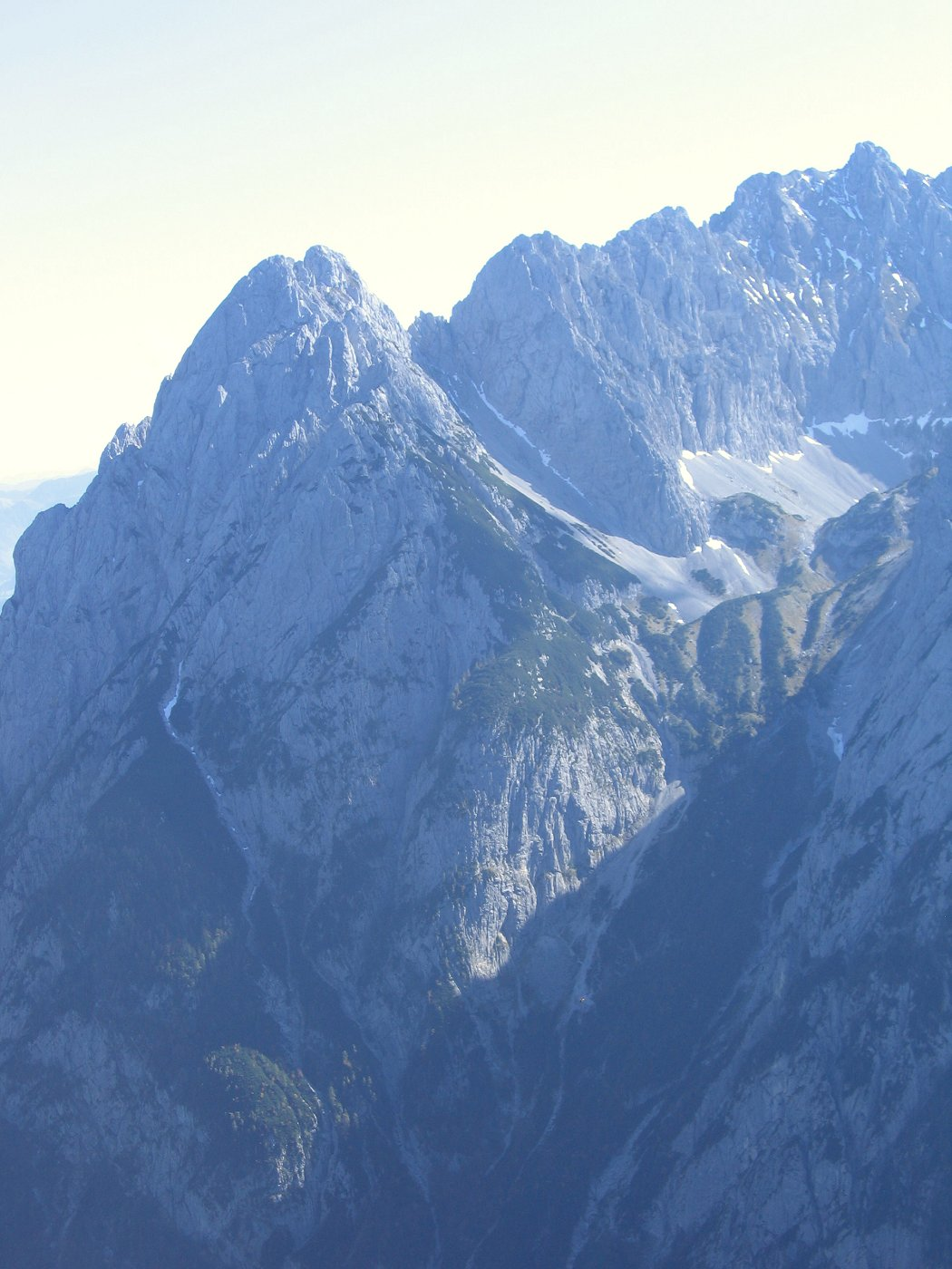 Lärcheck vom Feldberg gesehen